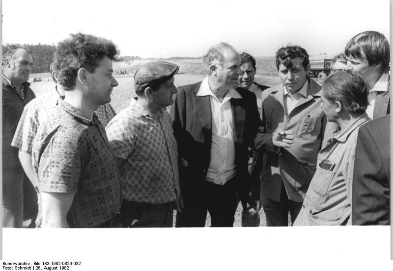 LPG Cobbelsdorf, Besuch einer kubanischen Delegation ADN-ZB Schmidt 26.8.82- Bez. Karl-Marx-Stadt: Kuba-Besuch- Die Delegation der Nationalversammlung der Republik Kuba unter Leitung ihres Präsidenten, Flavio Bravo (M.), besuchte die Genossenschaftsbauern der LPG Pflanzenproduktion Blankenhain, Kreis Werdau.